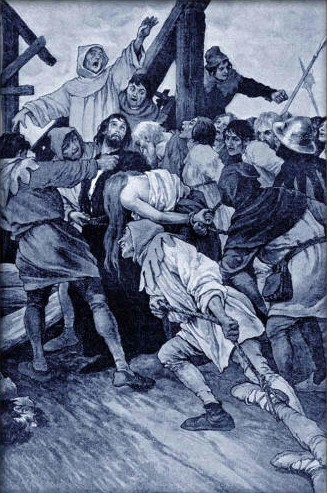 Věnceslav Černý - Kutnohorští horníci metají zajaté Husity do šachet